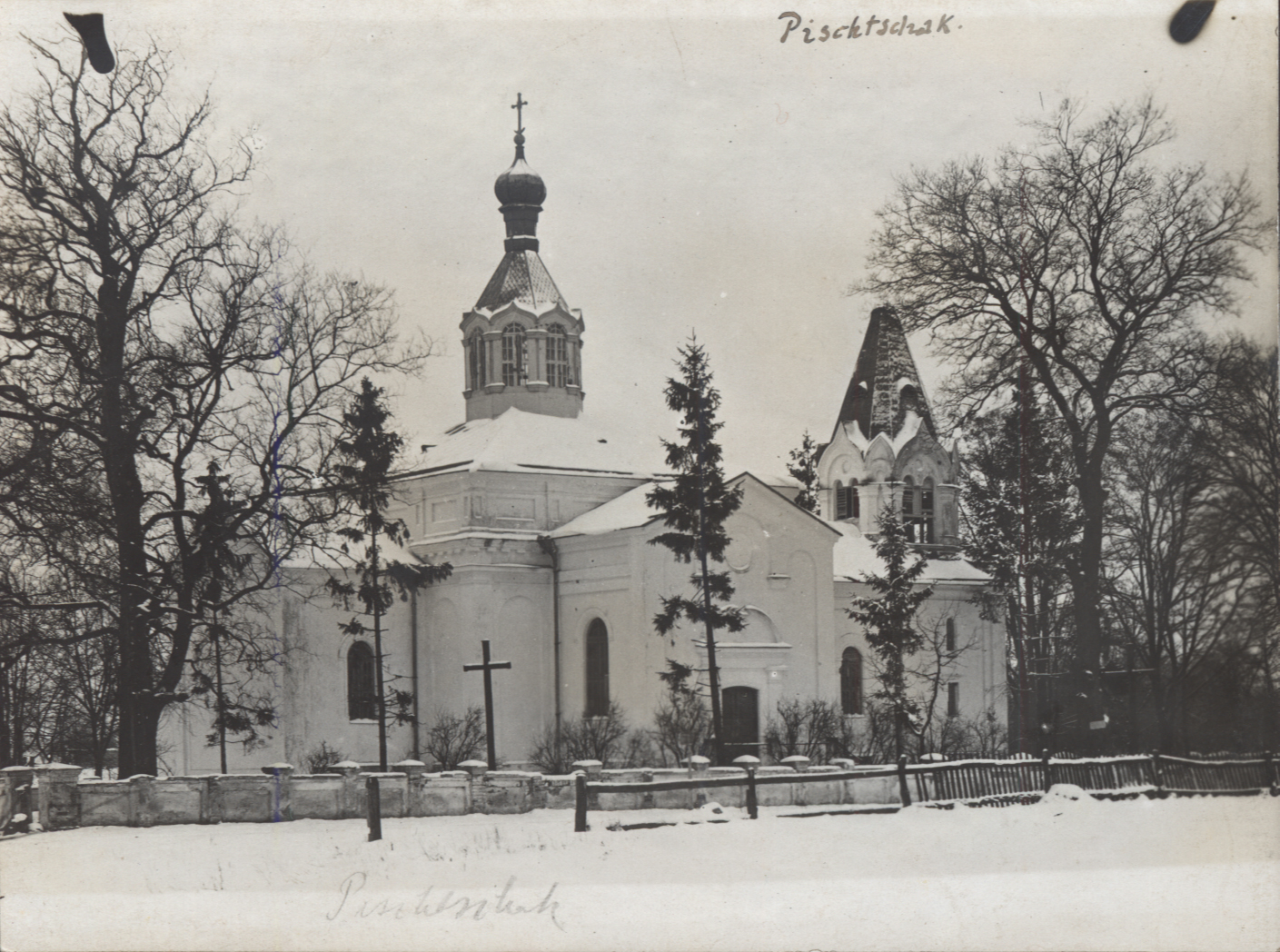 Беларуская (тарашкевіца): Пішчац (Piščac). Прадцечанская царква-мураўёўка